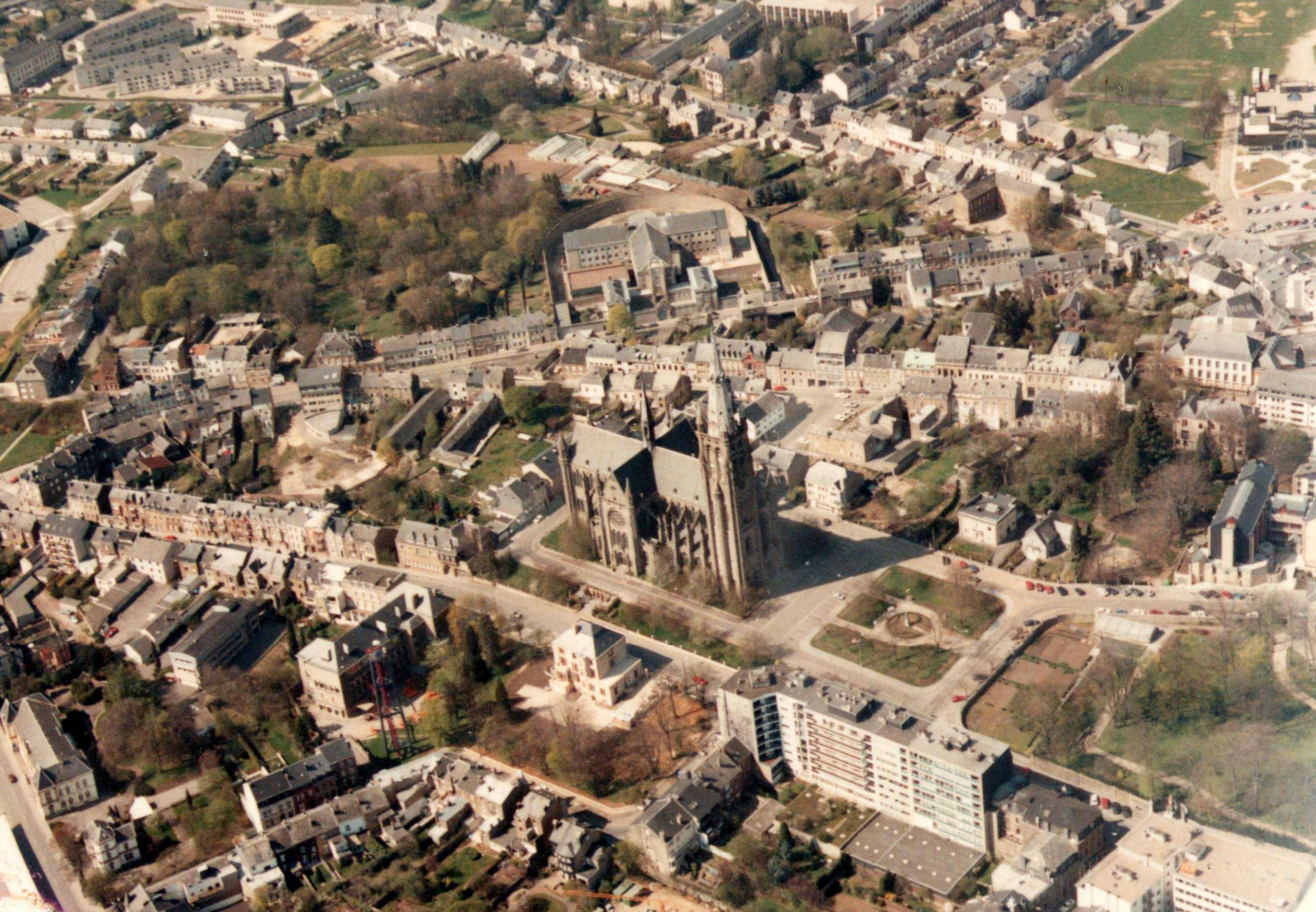 Église Saint-Martin d'Arlon en 1991